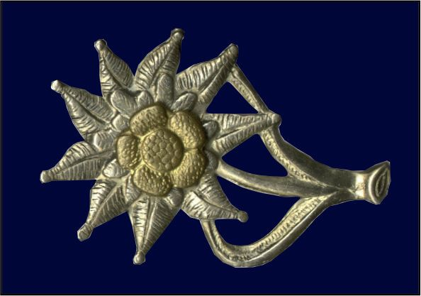 WZÓR GRAFICZNY PROPORCZYKA NA BERET DOWÓDZTWA 21. BRYGADY STRZELCÓW PODHALAŃSKICH